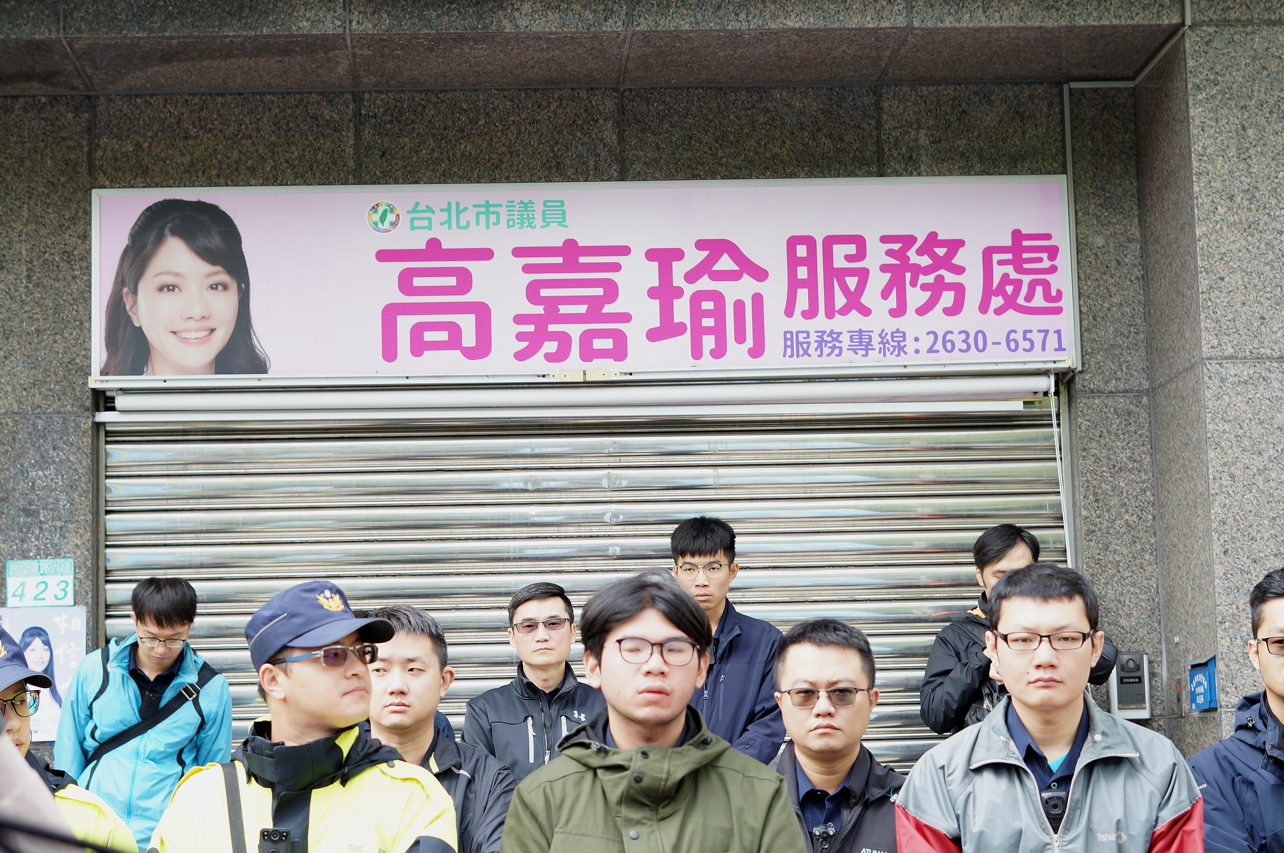 一邊一國行動黨赴民主進步黨臺北市議員高嘉瑜服務處抗議，高嘉瑜服務處拉下鐵門，臺北市政府警察局內湖分局警員與高嘉瑜服務處工作人員於鐵門前排成人牆。高嘉瑜服務處地址：臺北市內湖區民權東路六段423號1樓。